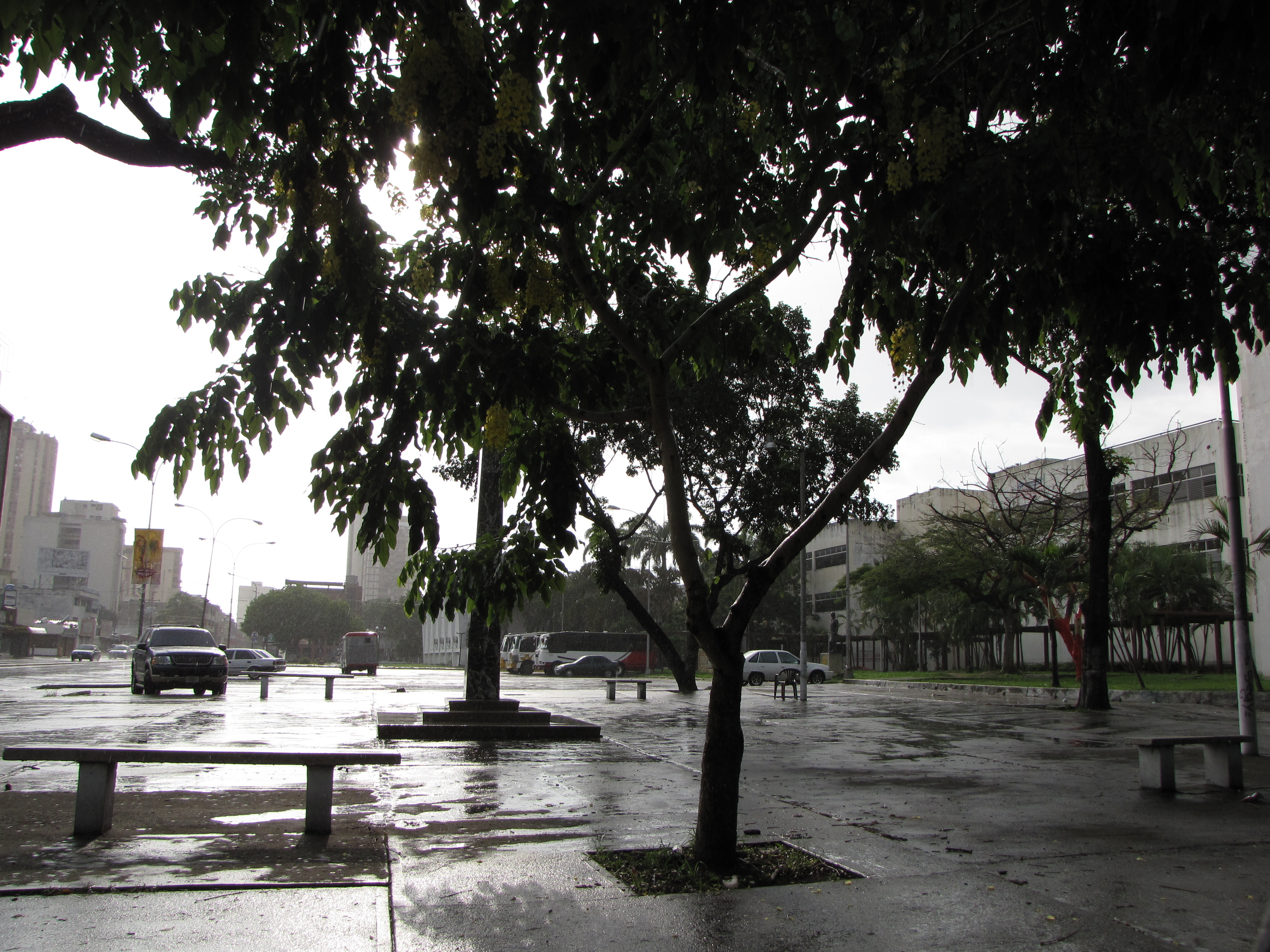 Lugar / place / lieu : Maracay, Estado Aragua, Venezuela.